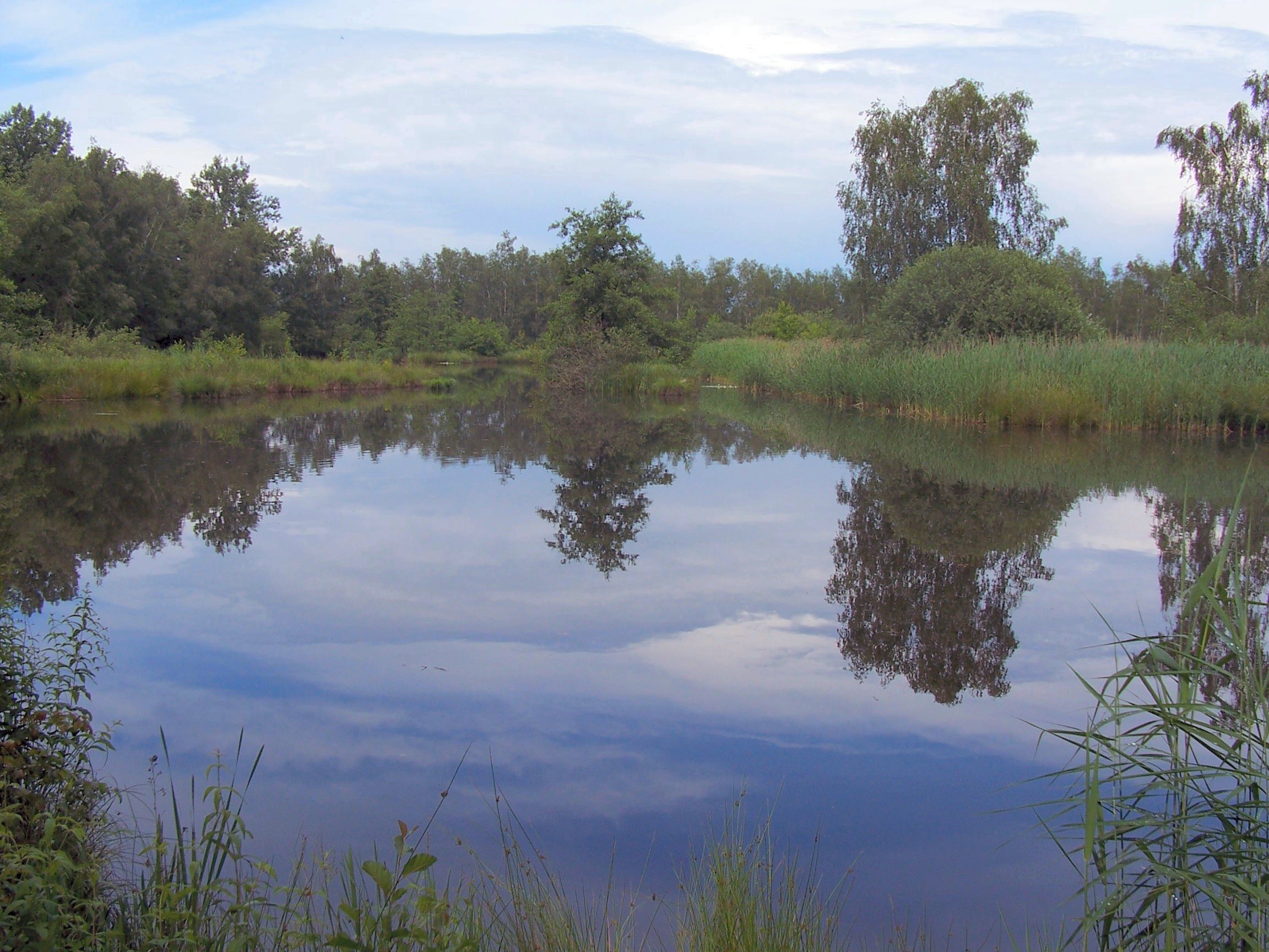 Plas in natuurgebied De Luysen.